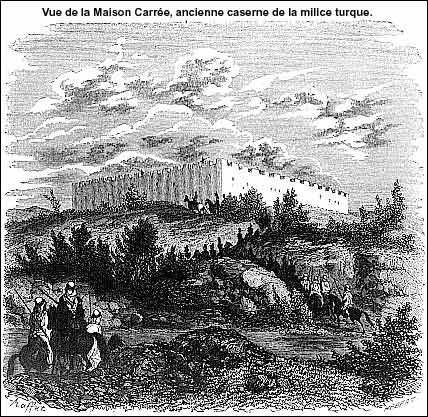 El Harrach (Maison-Carrée) à l'époque ottomane